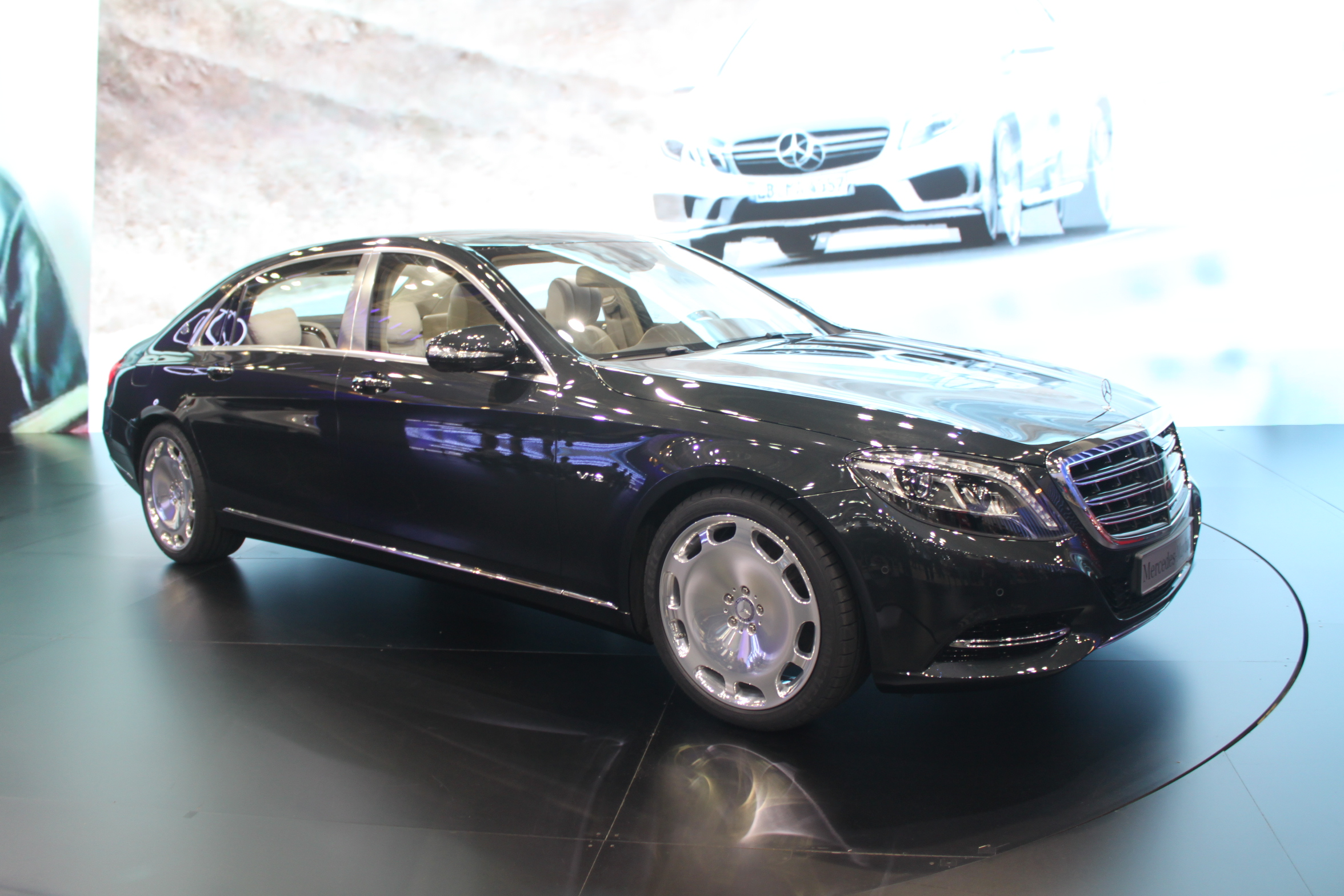 서울모터쇼에 전시된 메르세데스 벤츠 S클래스 마이바흐